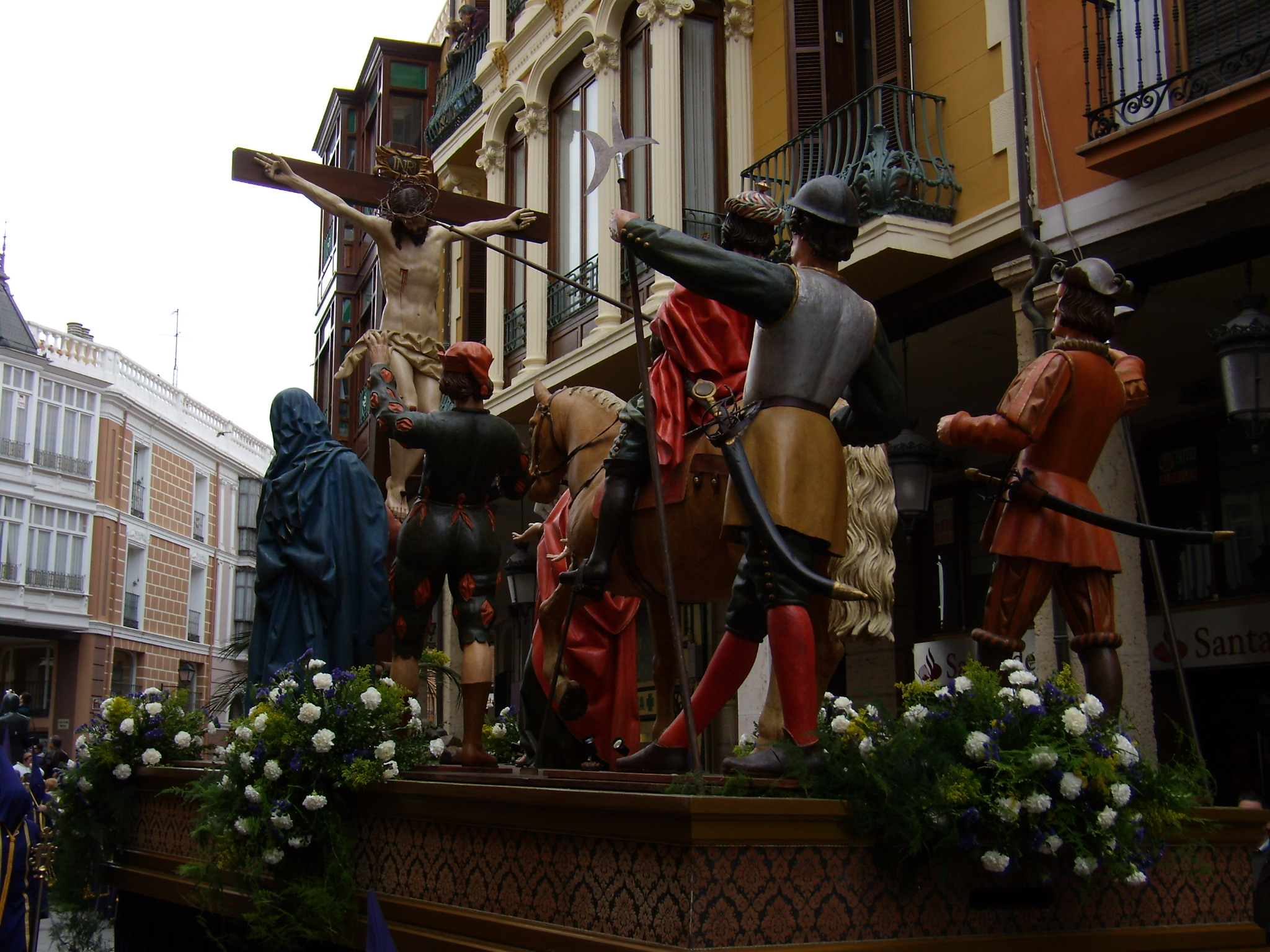 Longinos, Semana Santa de Palencia.